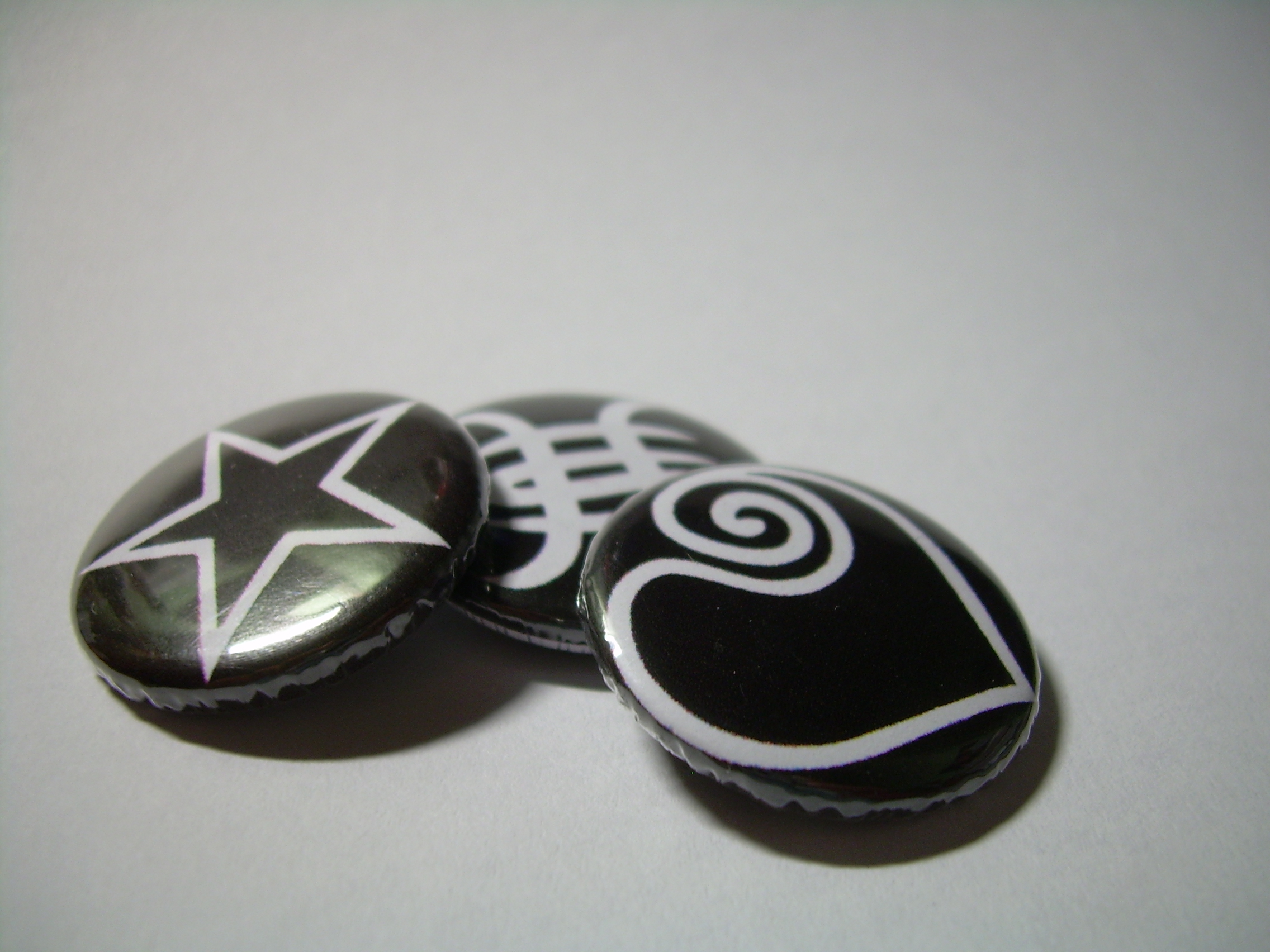 Chapas con símbología del grupo Héroes del Silencio.